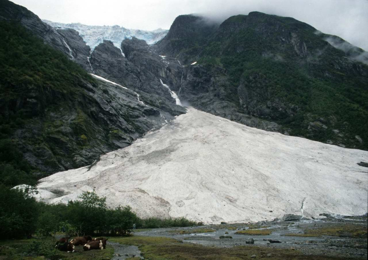 Supphellebreen i Fjærland, Sogndal kommune